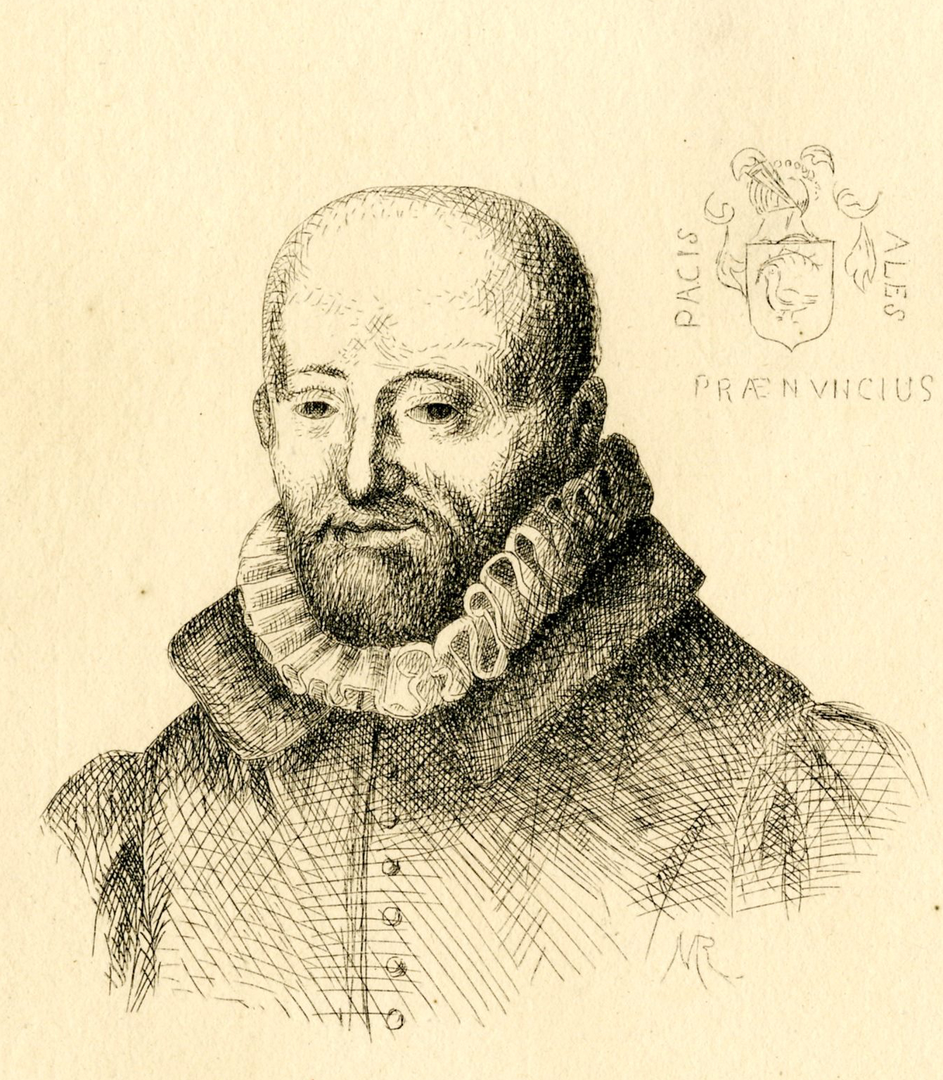 Gravure d'Antoine Loisel, d'après le portrait conservé au Musée de Beauvais